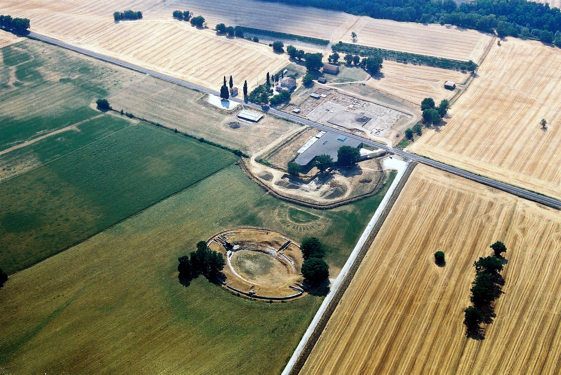 Anfiteatro dell'Area Archeologica della città romana di Suasa - MIBAC This is a photo of a monument which is part of cultural heritage of Italy.